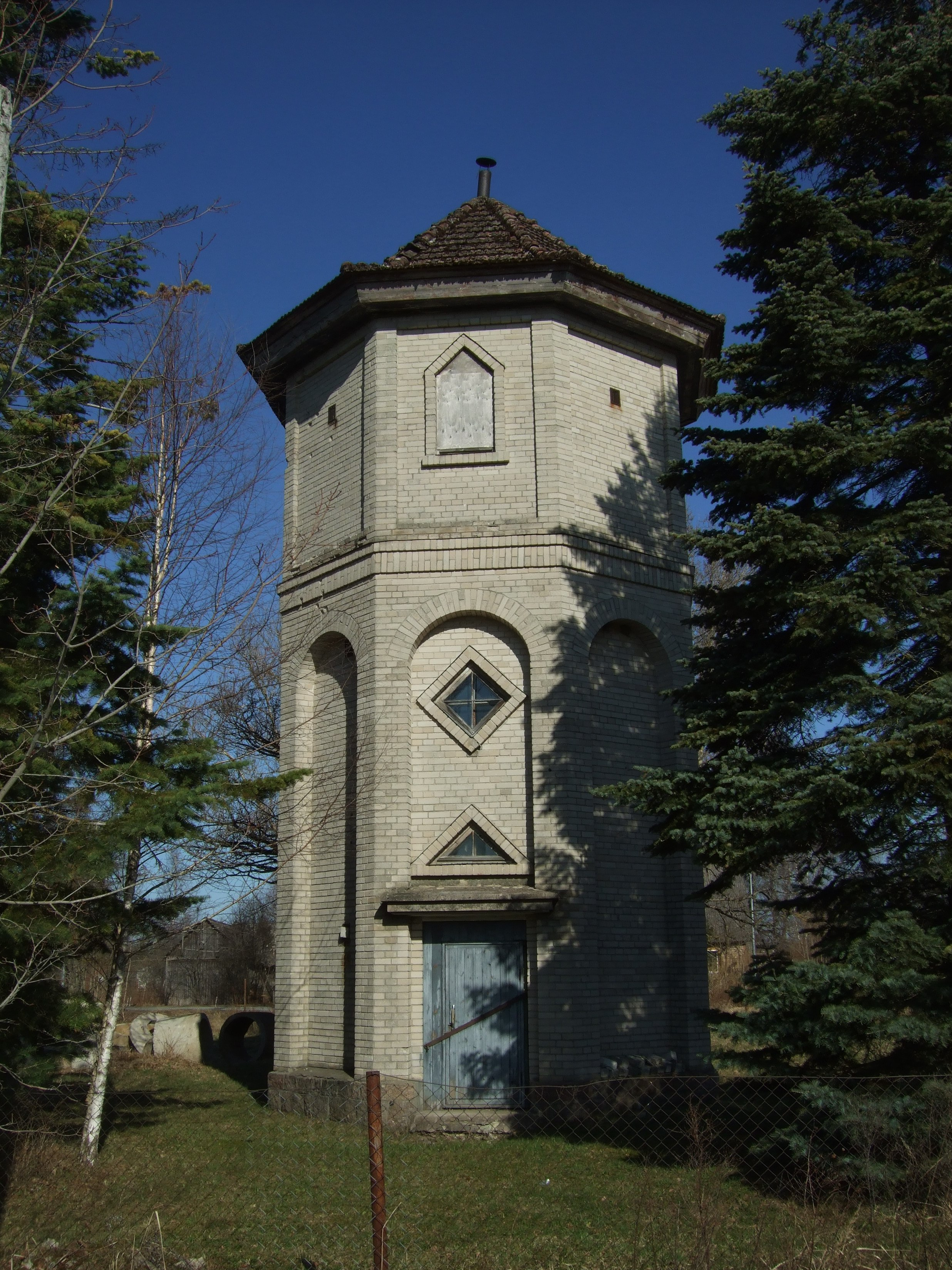 Märjamaa raudteejaama veetorn